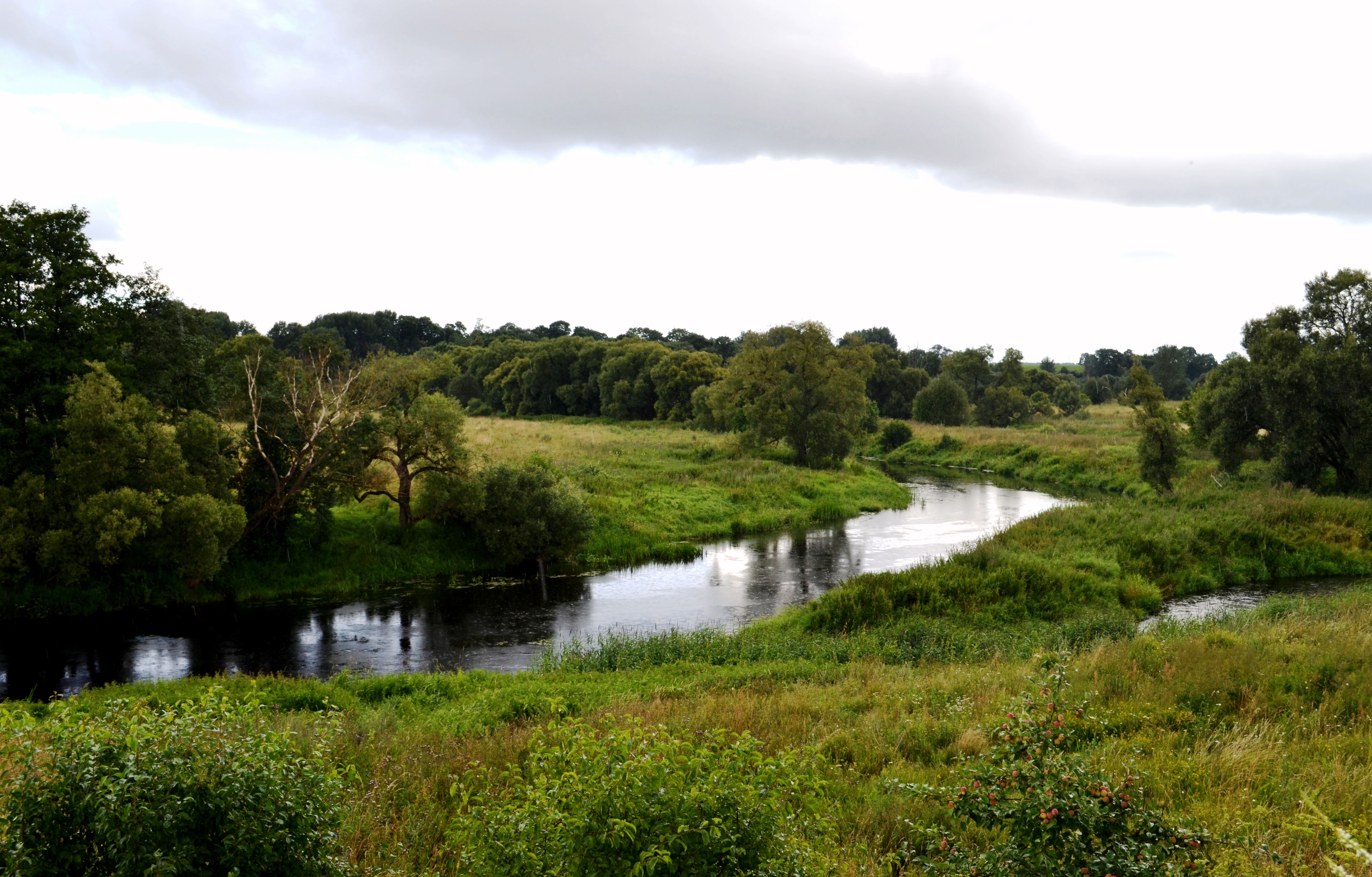 Nevėžis ties Gringaliais, Panevėžio raj.